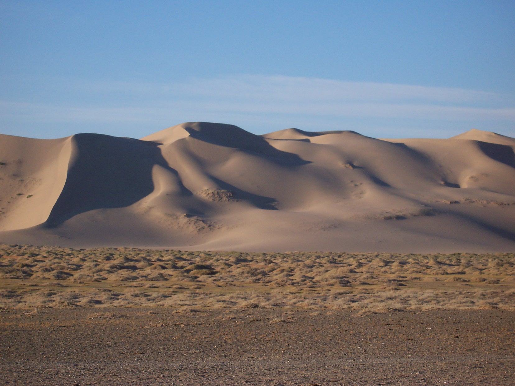 Les dunes de KhongoriKhongory dunes dans le désert de Gobi.